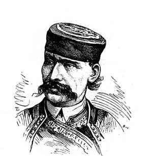 Стоян Ковачевич